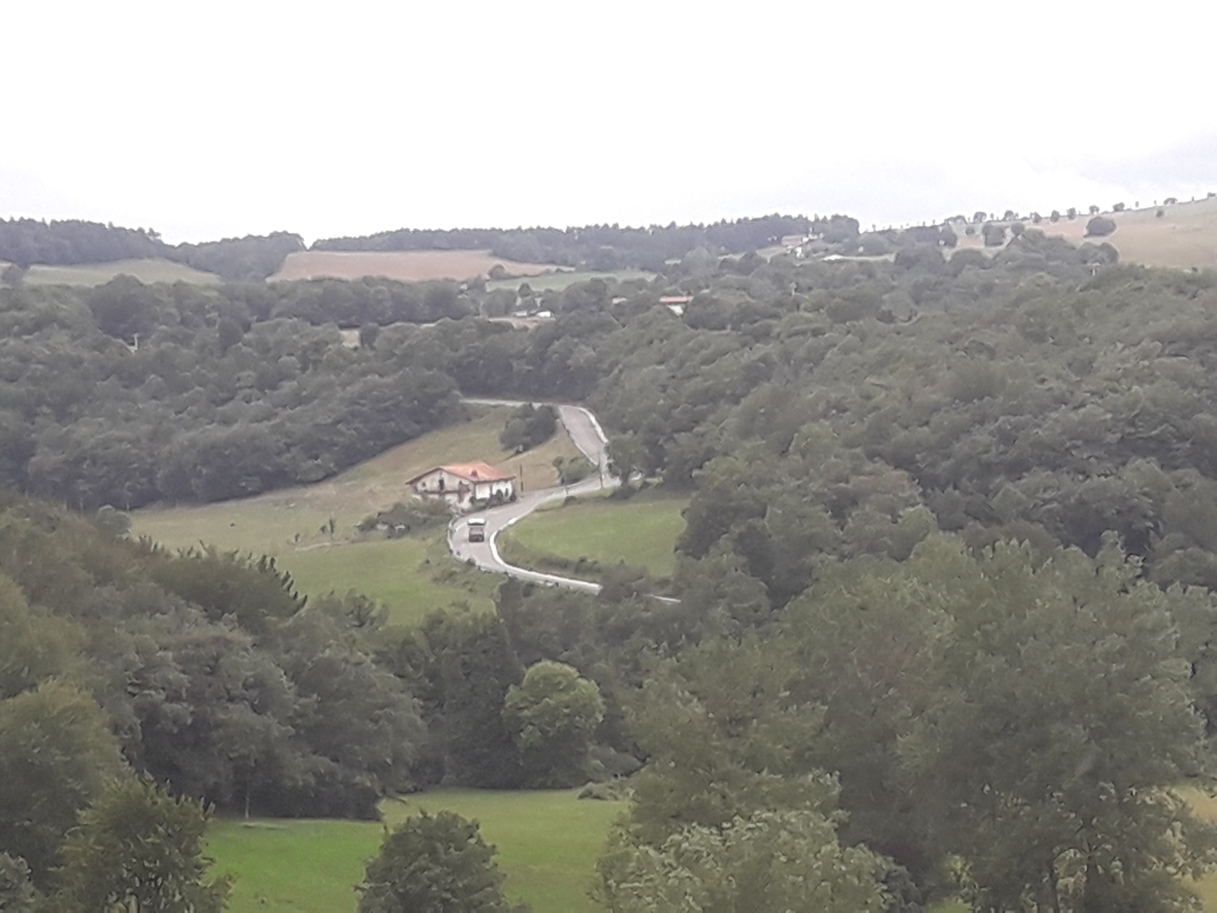 Carretera de Basaburua (NA-411) vista des de prop d'Ihaben (Basaburua)